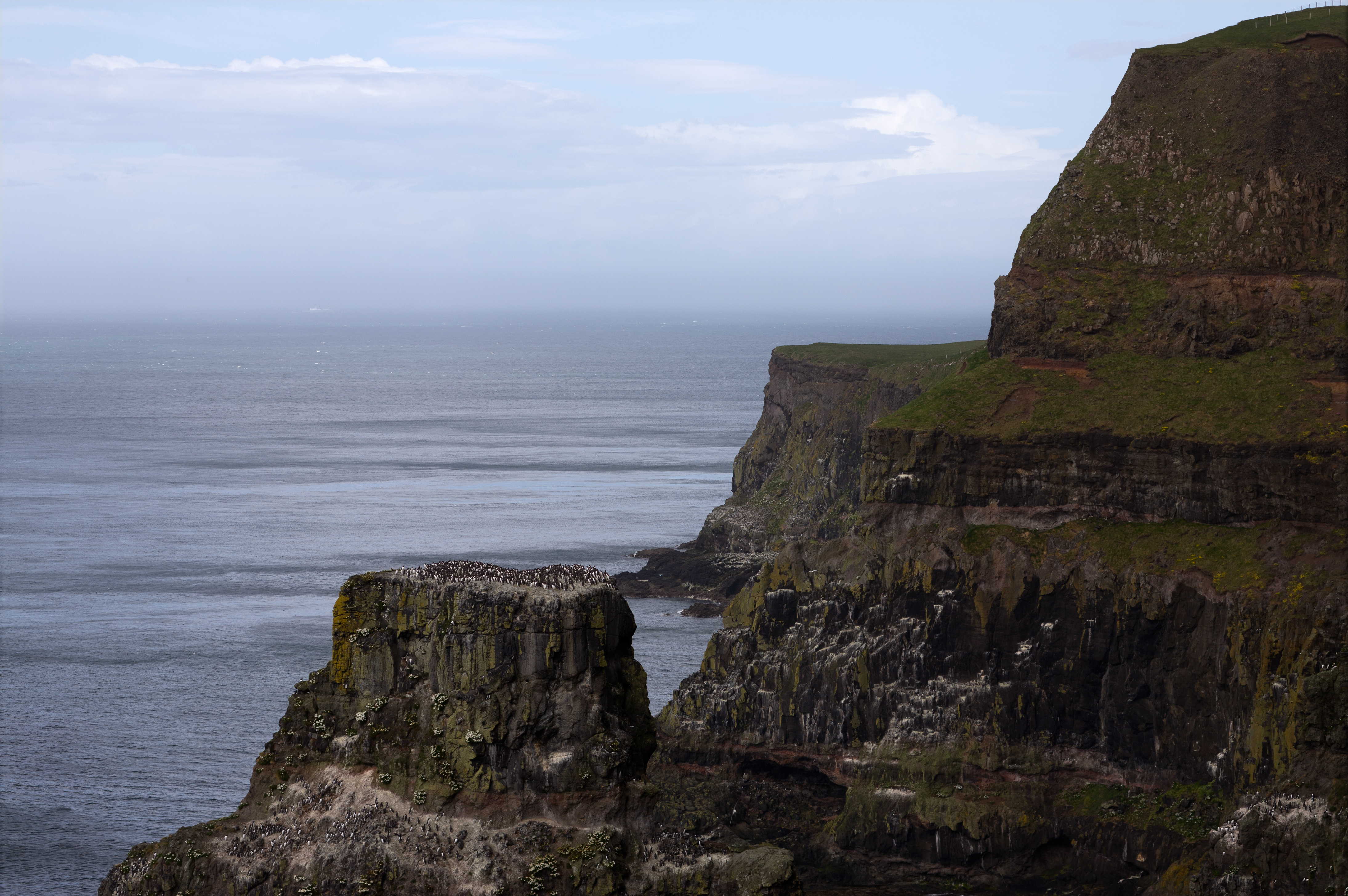 Eine Kolonie Trottellummen brütet an einer unzugänglichen Steilküste der Insel Rathlin Island im Nordosten Irlands.